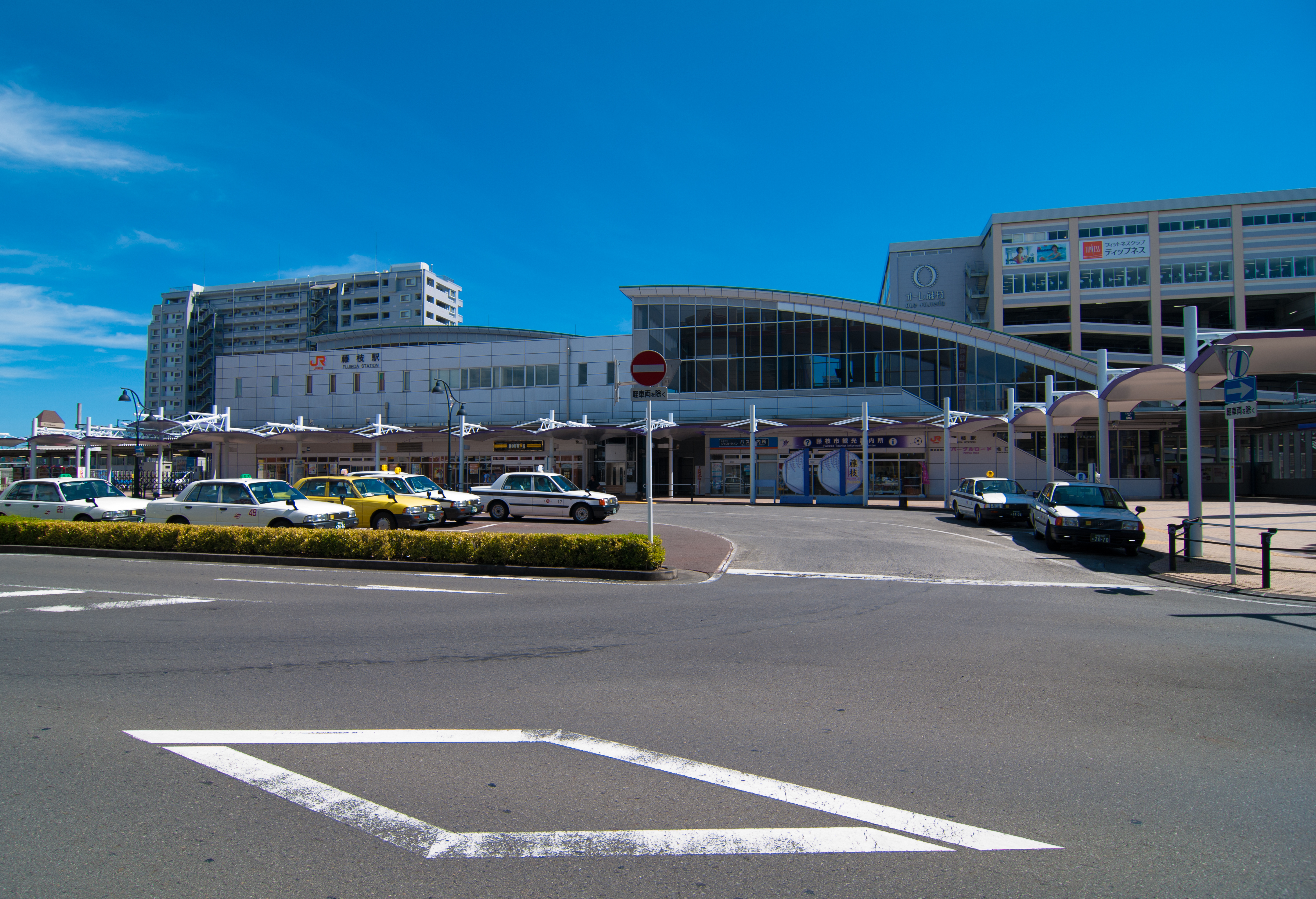 東海旅客鉄道株式会社東海道本線藤枝駅北口